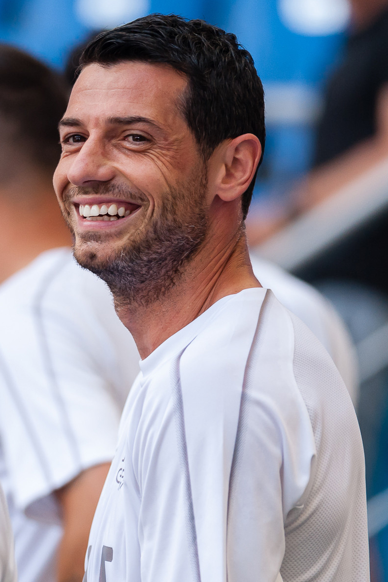 Бразилия и Швейцария готовятся к очной встрече на «Ростов Арене»